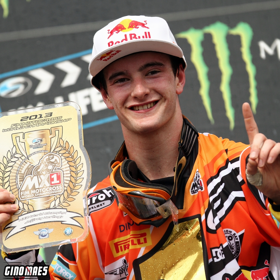 Jeffrey Herlings (Geldrop, 12 september 1994) is een Nederlands motorcrosser.